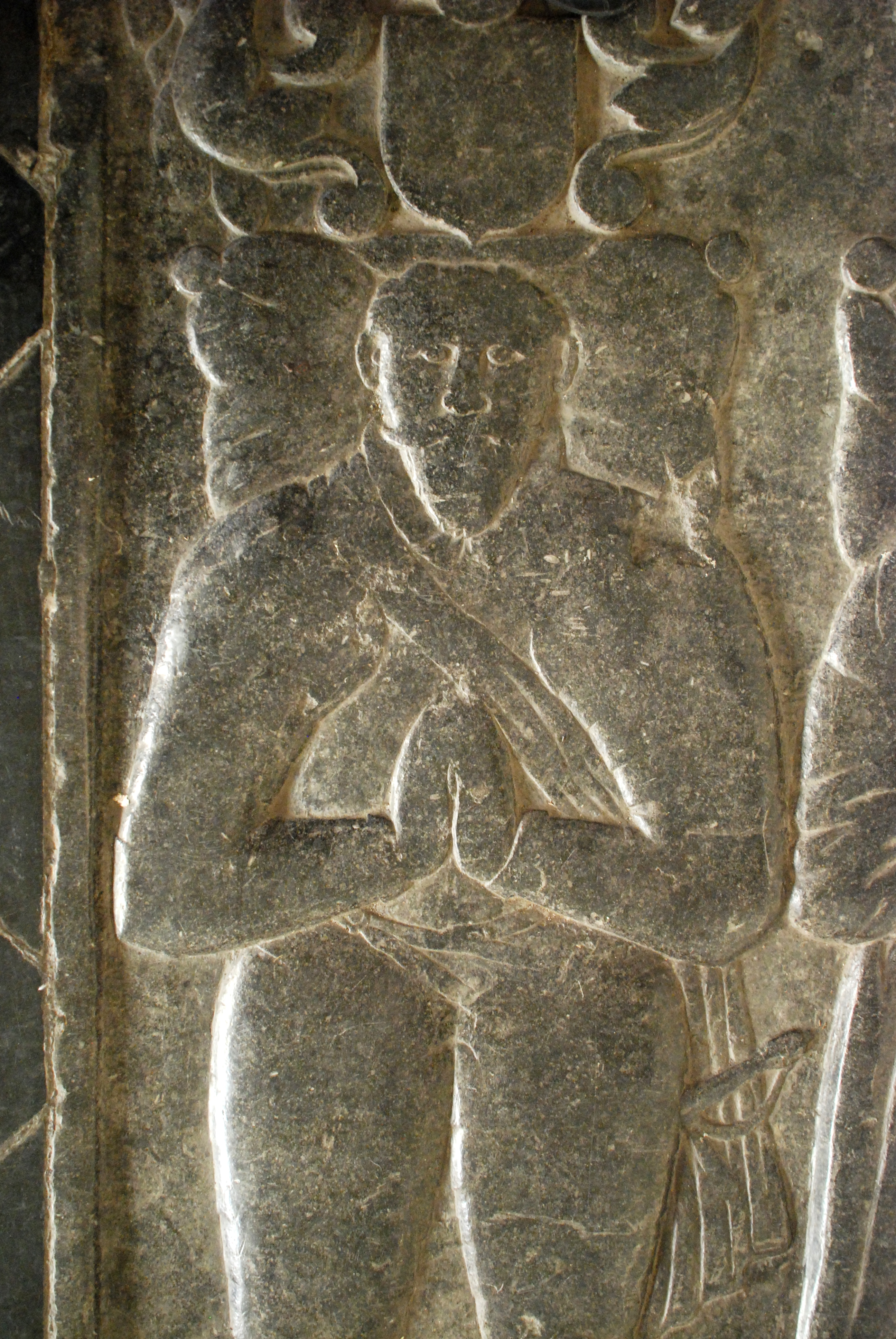 Belgique - Église Saint-Barthélémy de Bousval